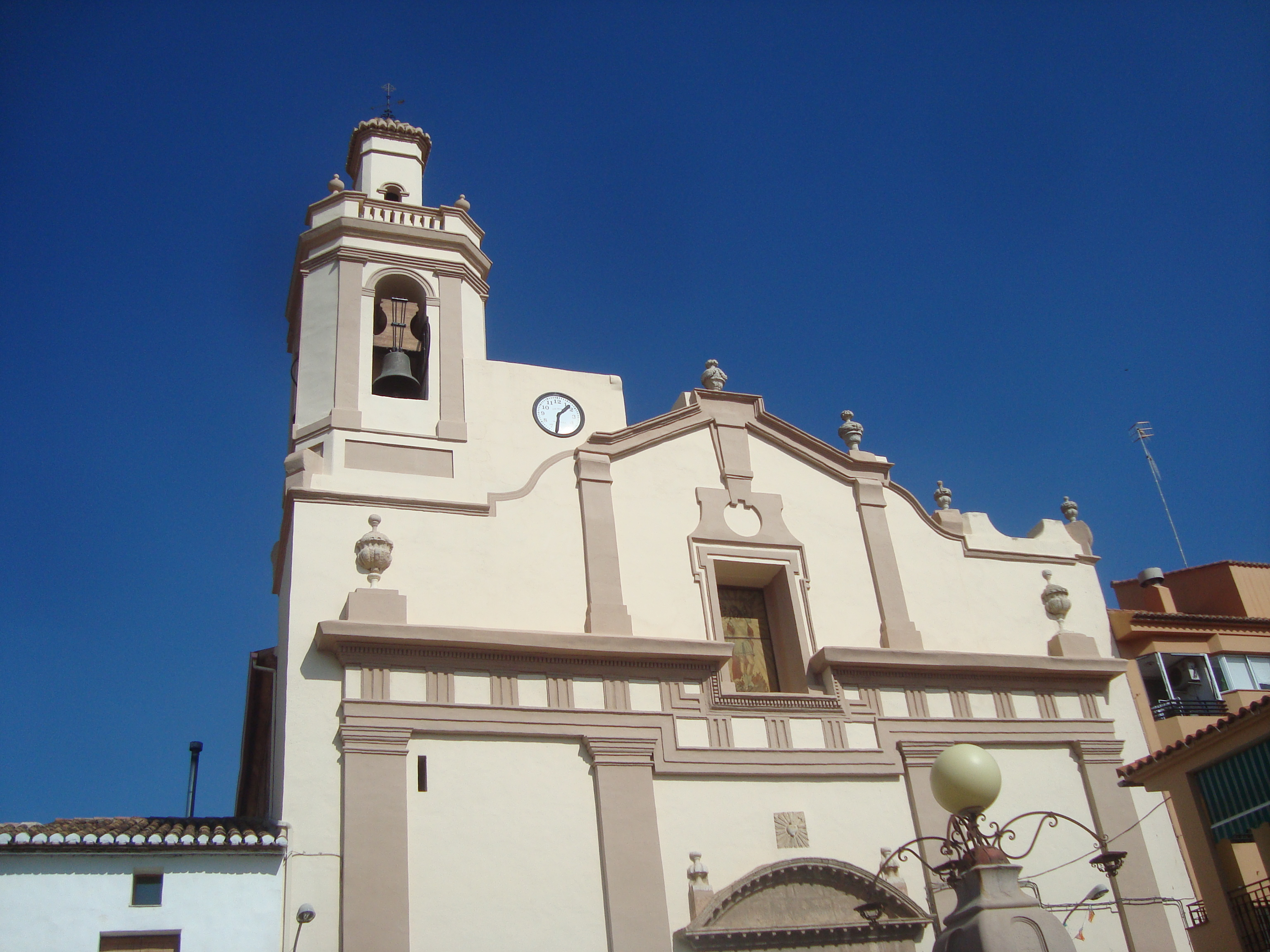 Església parroquial de Sant Miquel Arcàngel (Quart de les Valls) 12.101-003.